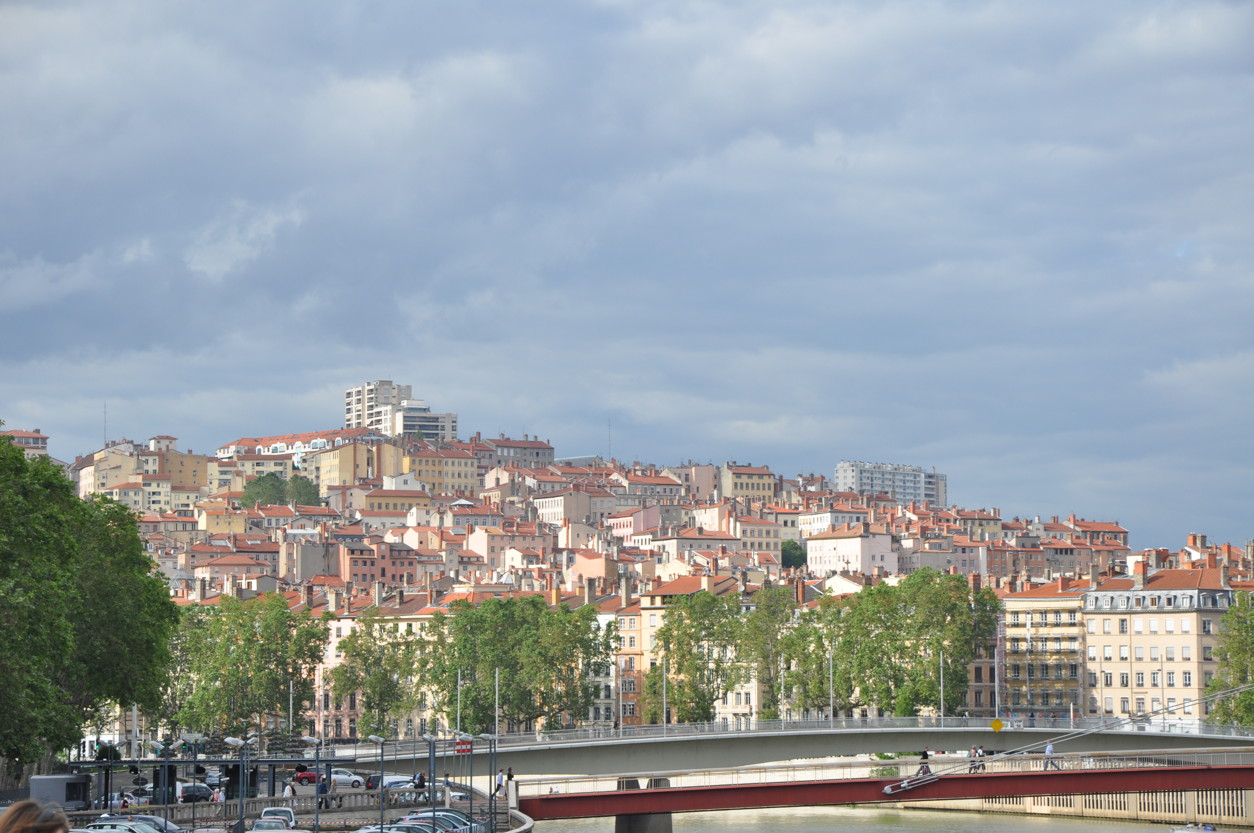 Lyon: la colline de la Croix-Rousse vue des ponts sur la Saône